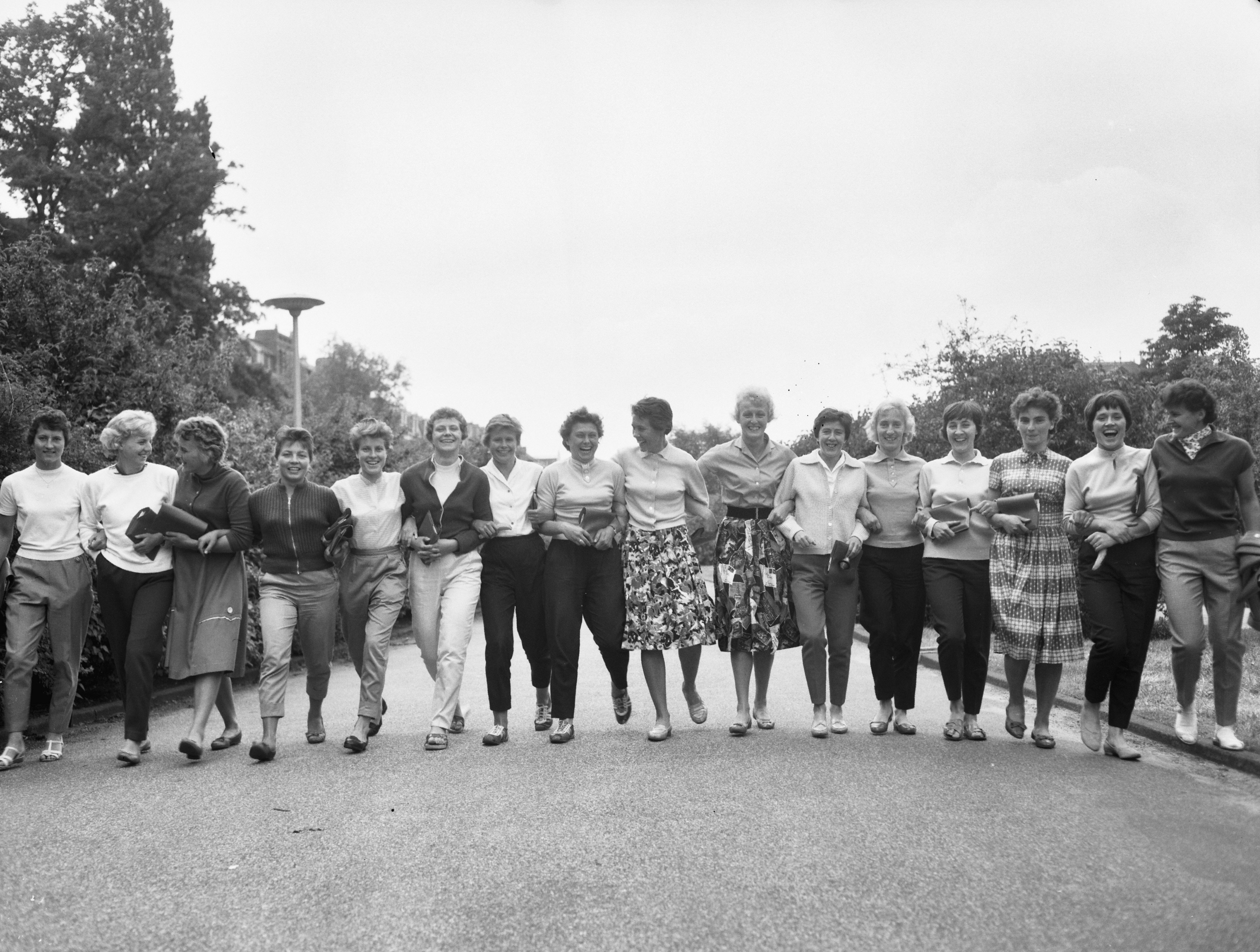 Collectie / Archief : Fotocollectie Anefo Reportage / Serie : [ onbekend ] Beschrijving : Eerste deelnemers van het wereldkampioenschap veldhandel Amsterdam gearriveerd, ploeg van West en Oost Duitsland Datum : 10 juni 1960 Locatie : Amsterdam, Duitsland Trefwoorden : deelnemers, ploegen, wereldkampioenschappen Fotograaf : Bilsen, Joop van / Anefo Auteursrechthebbende : Nationaal Archief Materiaalsoort : Negatief (zwart/wit) Nummer archiefinventaris : bekijk toegang 2.24.01.04 Bestanddeelnummer : 911-3286